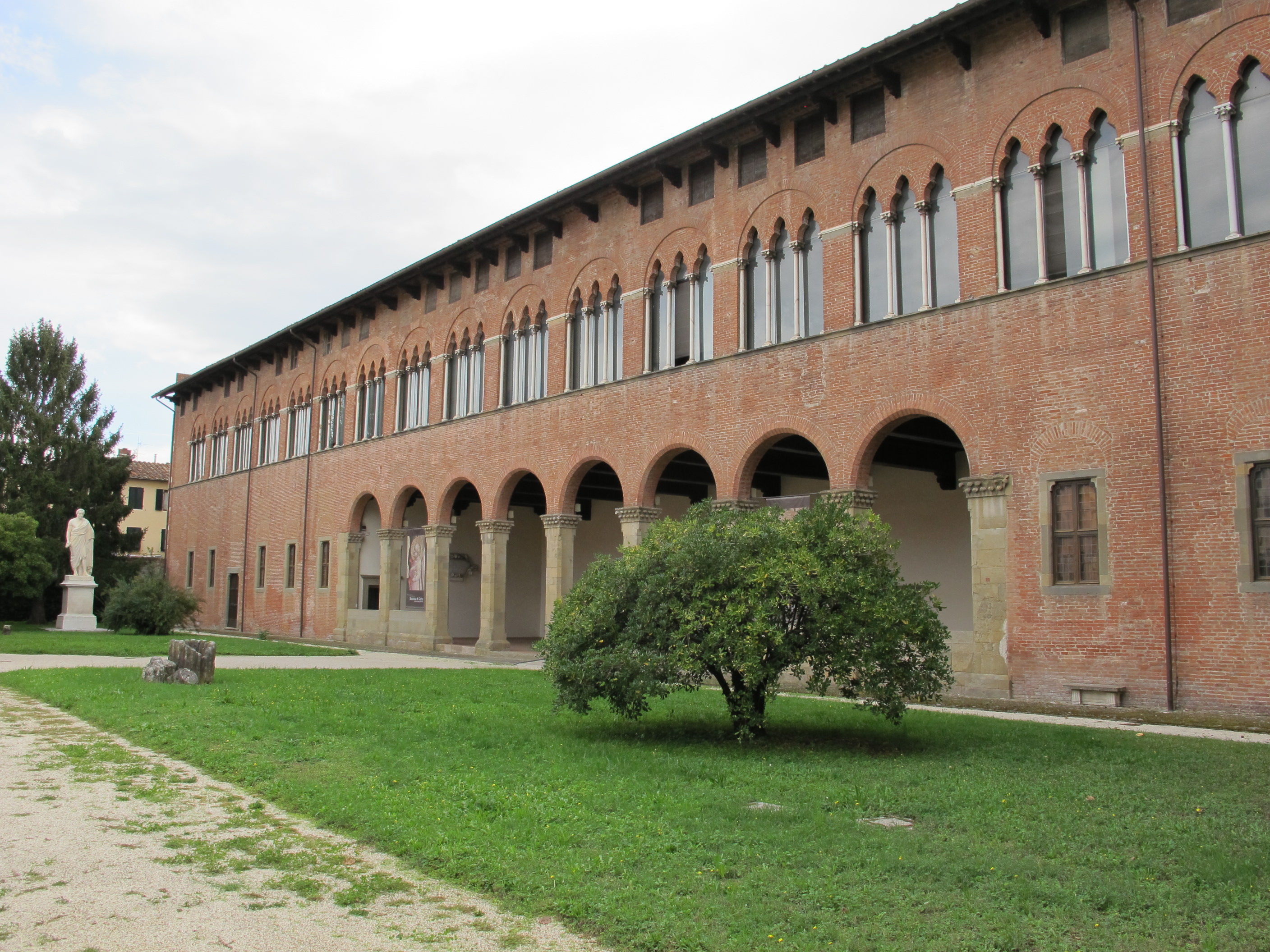 Museo nazionale di Villa Guinigi - MIBAC This is a photo of a monument which is part of cultural heritage of Italy.